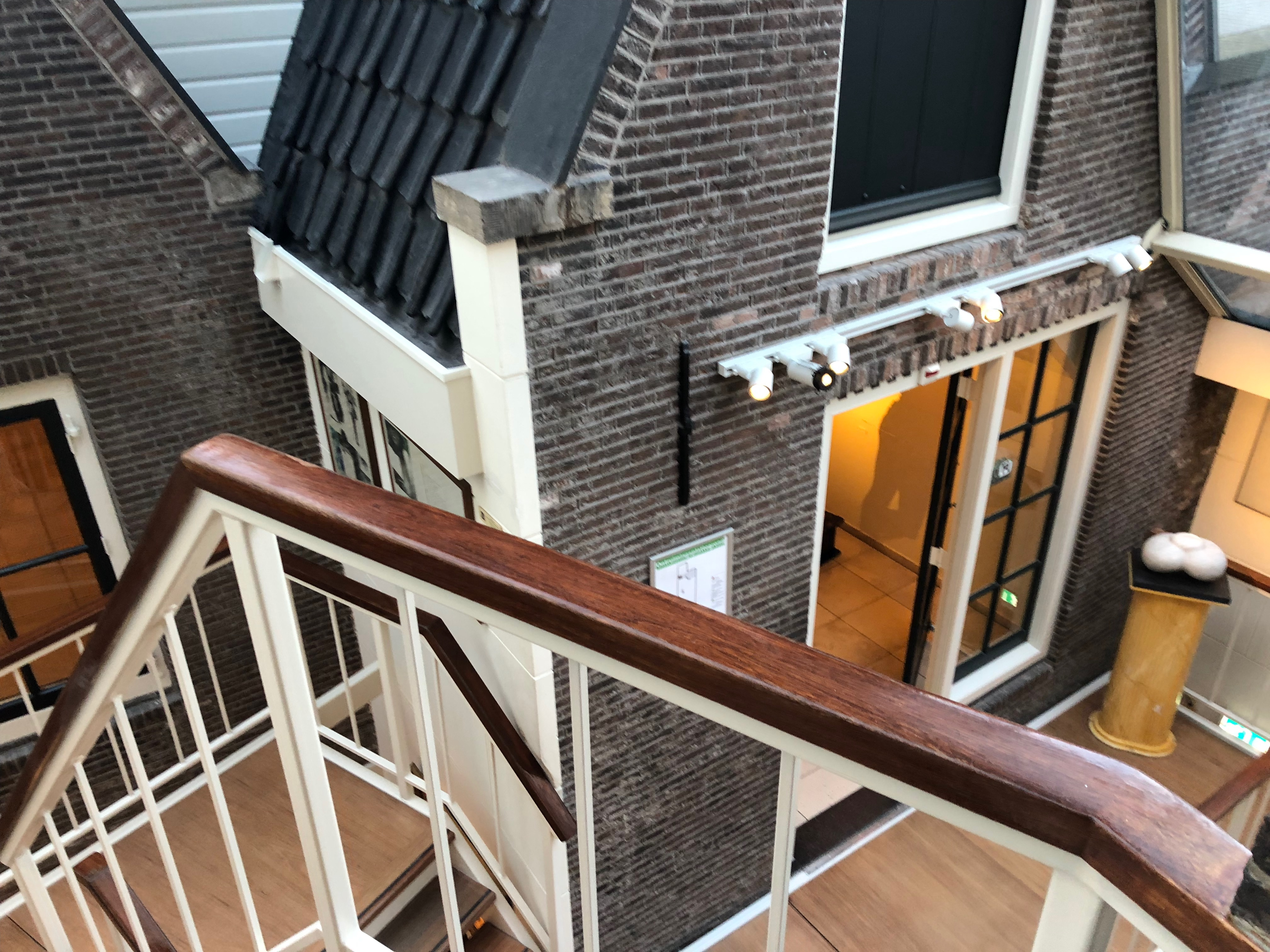 Sexmuseum Amsterdam